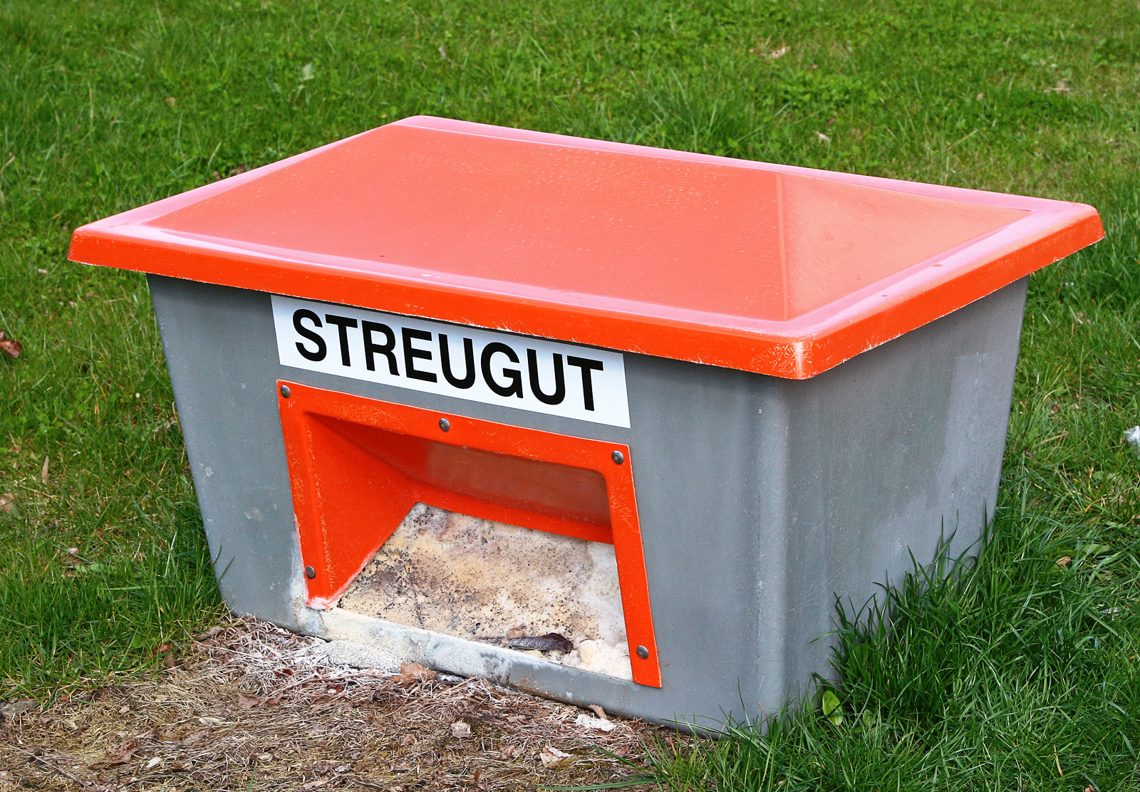 Streugutkiste, oder Streugutbehälter mit Entnahmeöffnung, freistehende Aufstellung